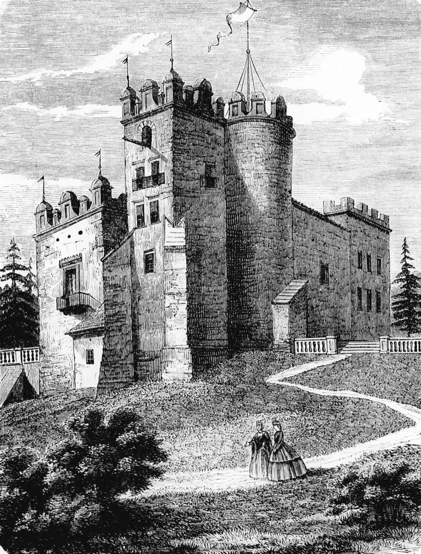 A nehrei várkastély. (Rajz. Myskovszky Viktor.) , Hazánk s a külföld 3. évf. 22. sz. (1867. május 30.)